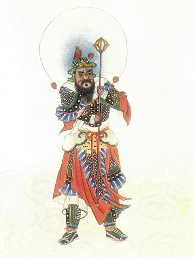 Door god - Civil